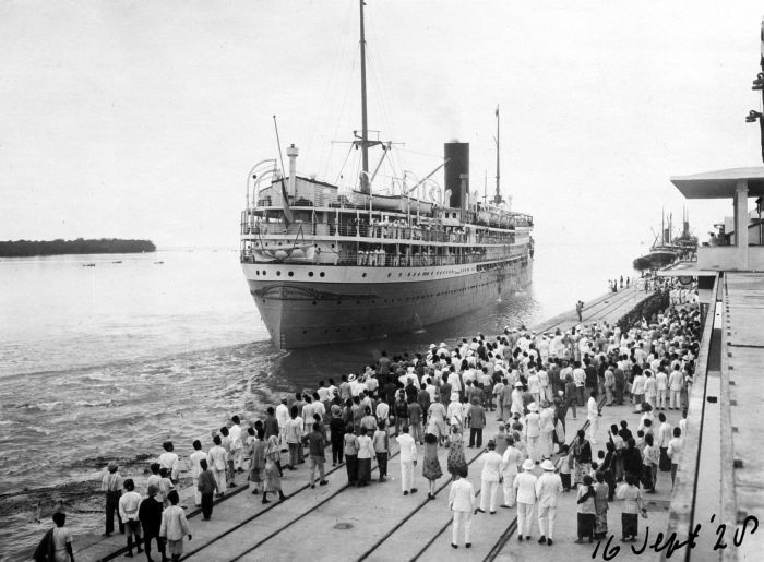 Repronegatief. Vertrek van de eerste mailboot van het Nederlandsch-Indische Scheepvaart Etablissement van de Rotterdamsche Lloyd uit Belawan, Noord-Sumatra